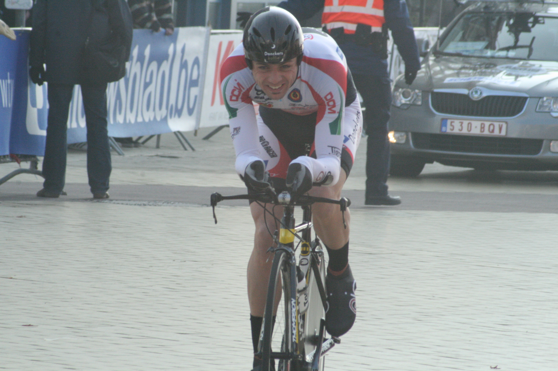 Driedaagse van West-Vlaanderen 2011, proloog in Middelkerke